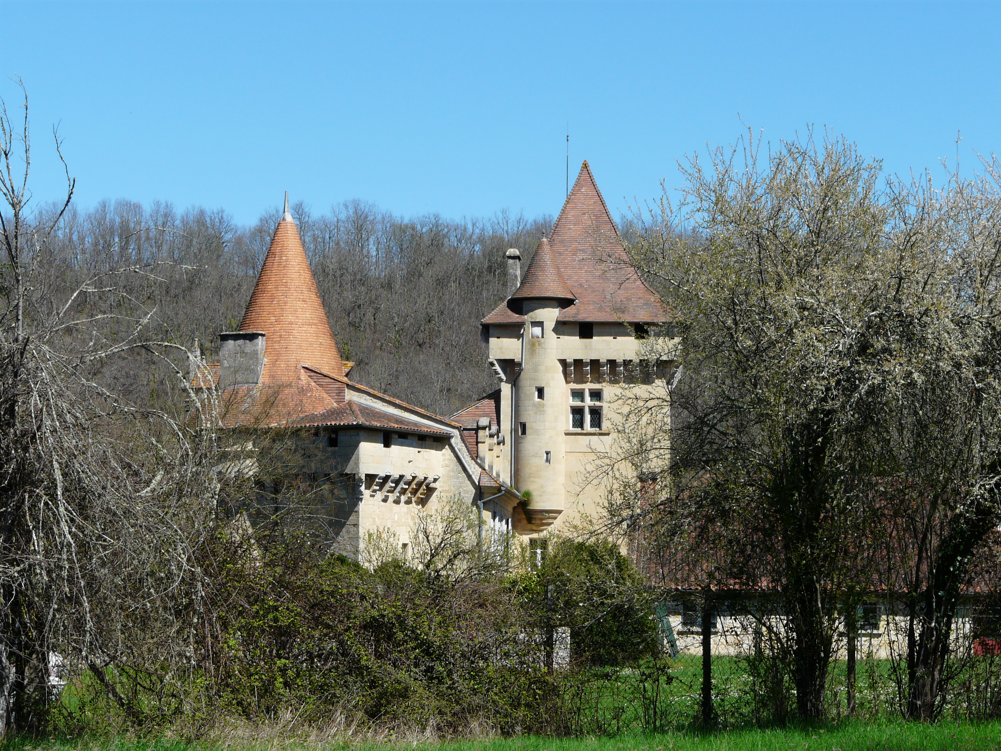 Le château de Bayac, Dordogne, France.